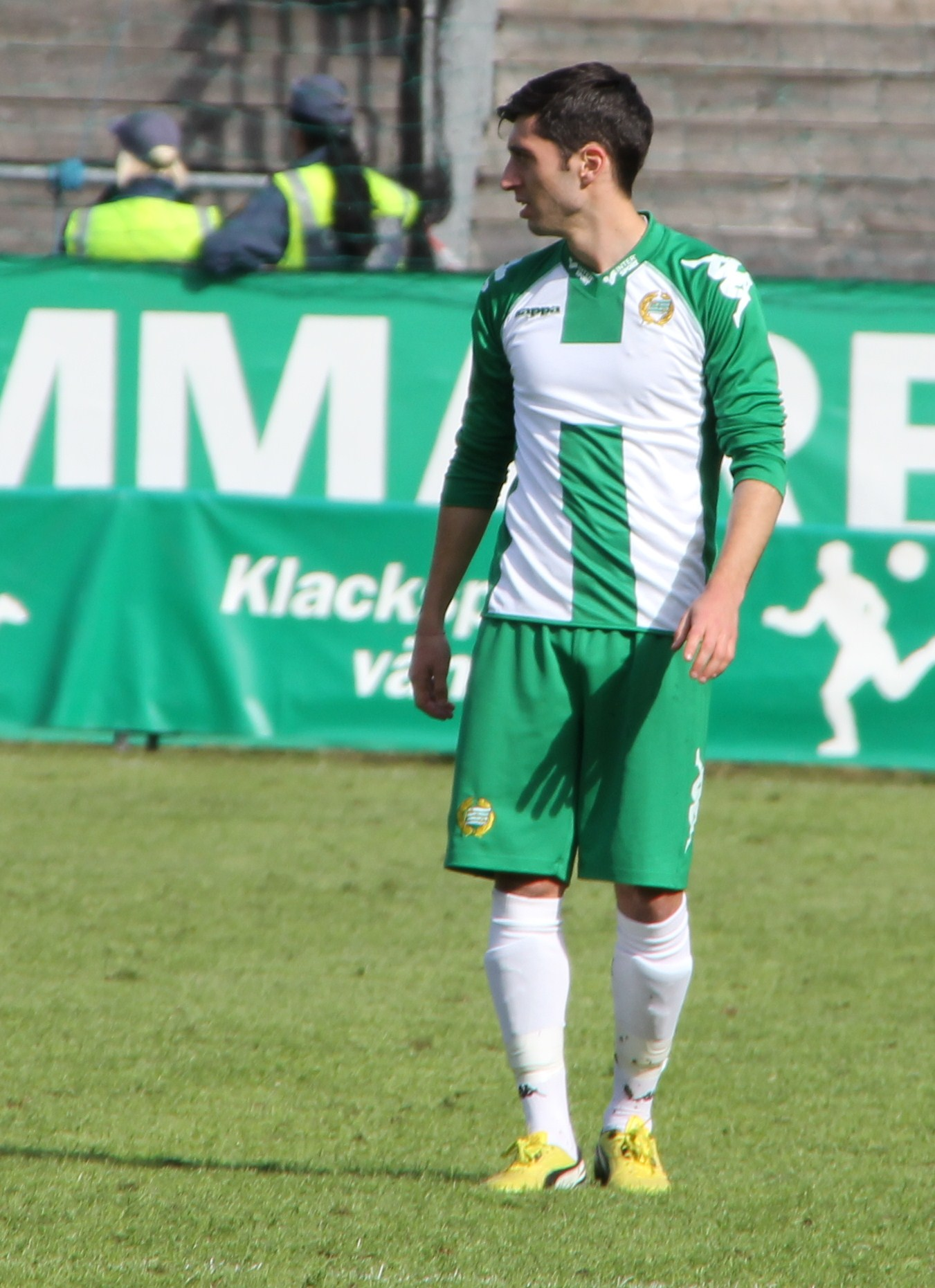 Hammarbys Nahir Besara.